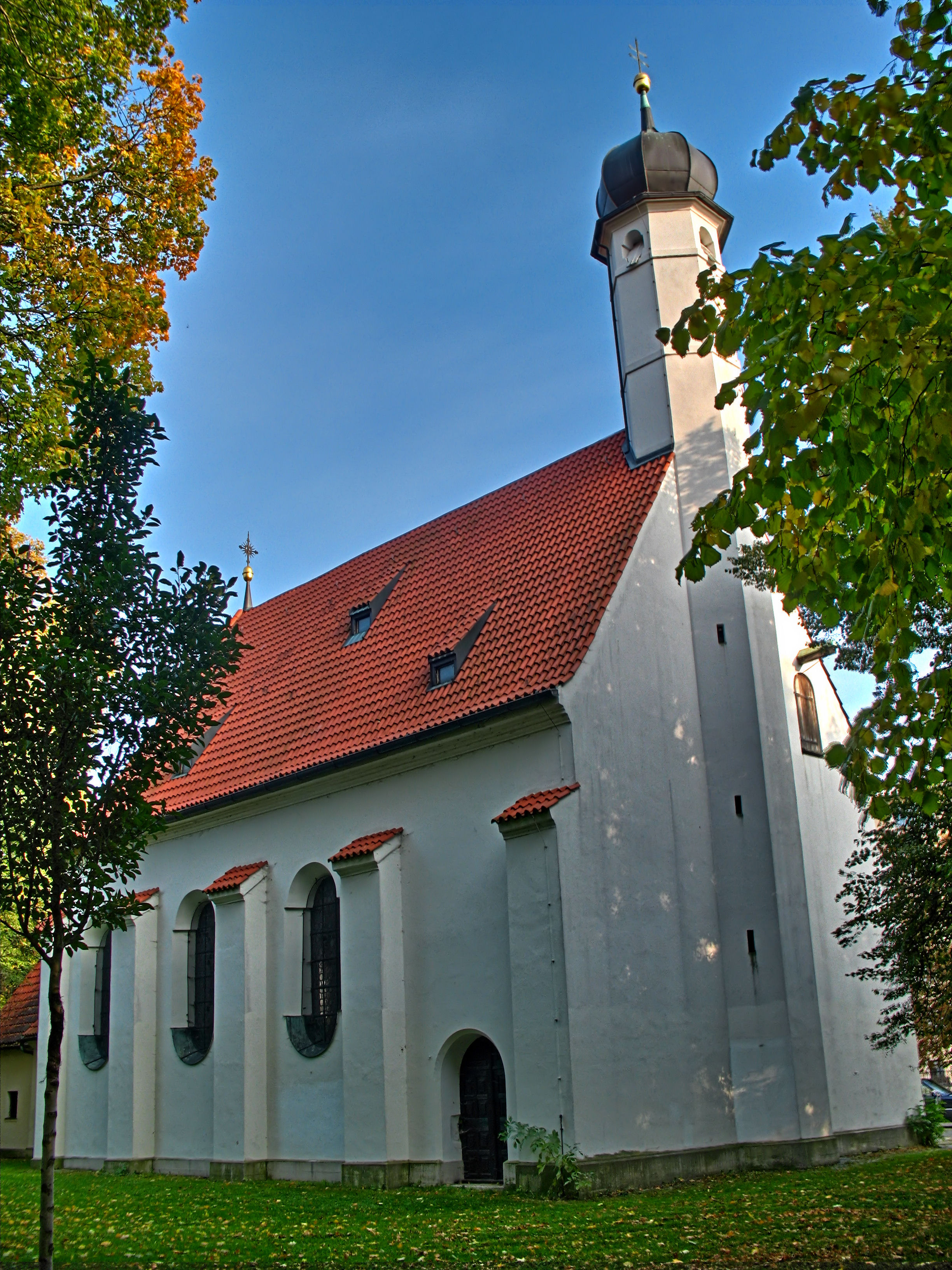 Bikol Central: Kirche St. Nikolai am Gasteig in München